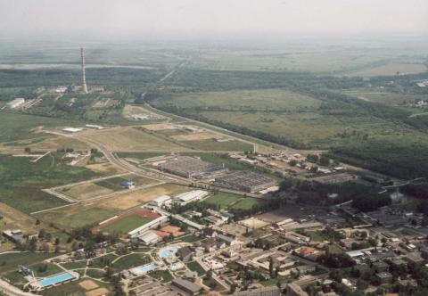 Tiszaújváros, Hungary, aerialphotgraphy